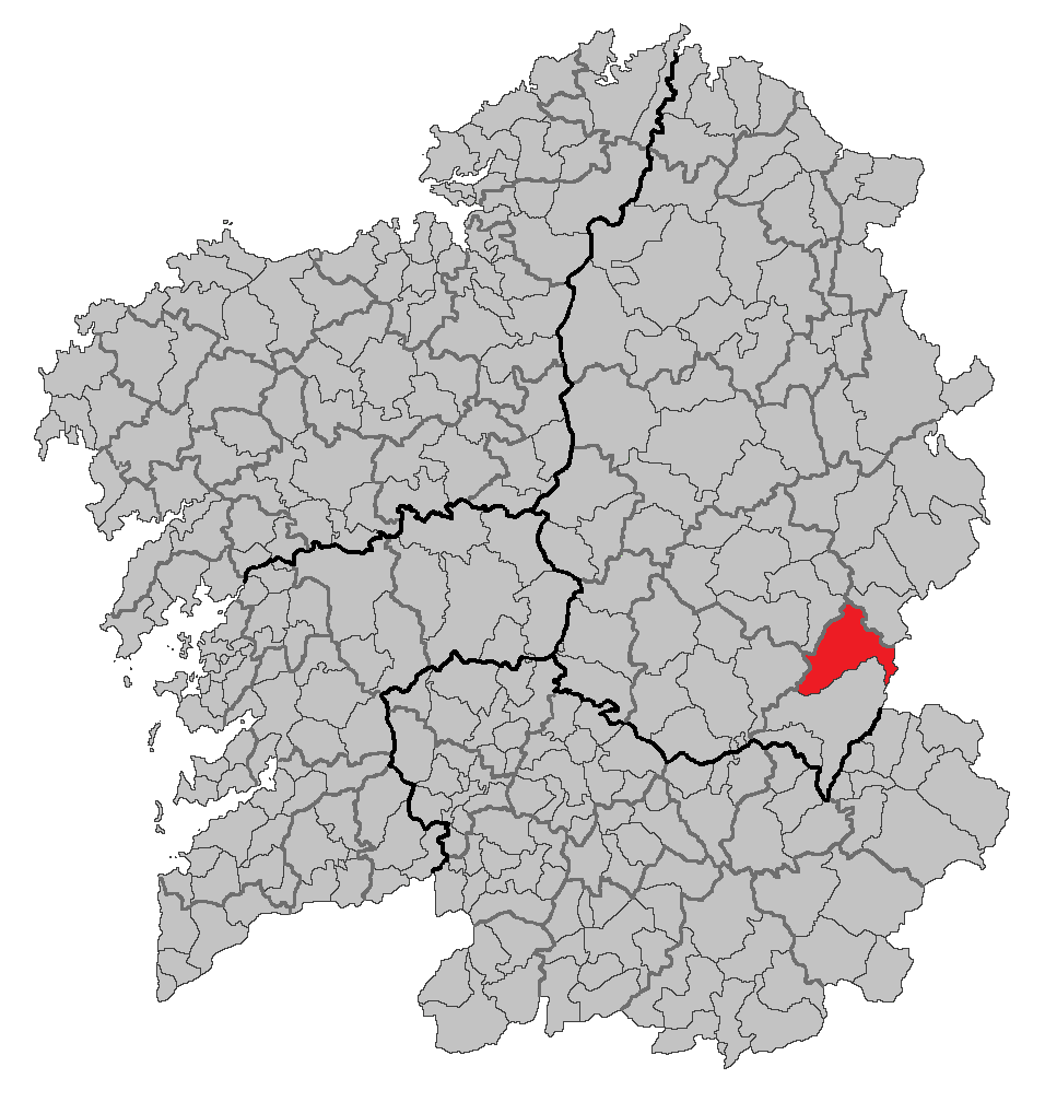 Mapa coa localización do concello de Folgoso do Courel.